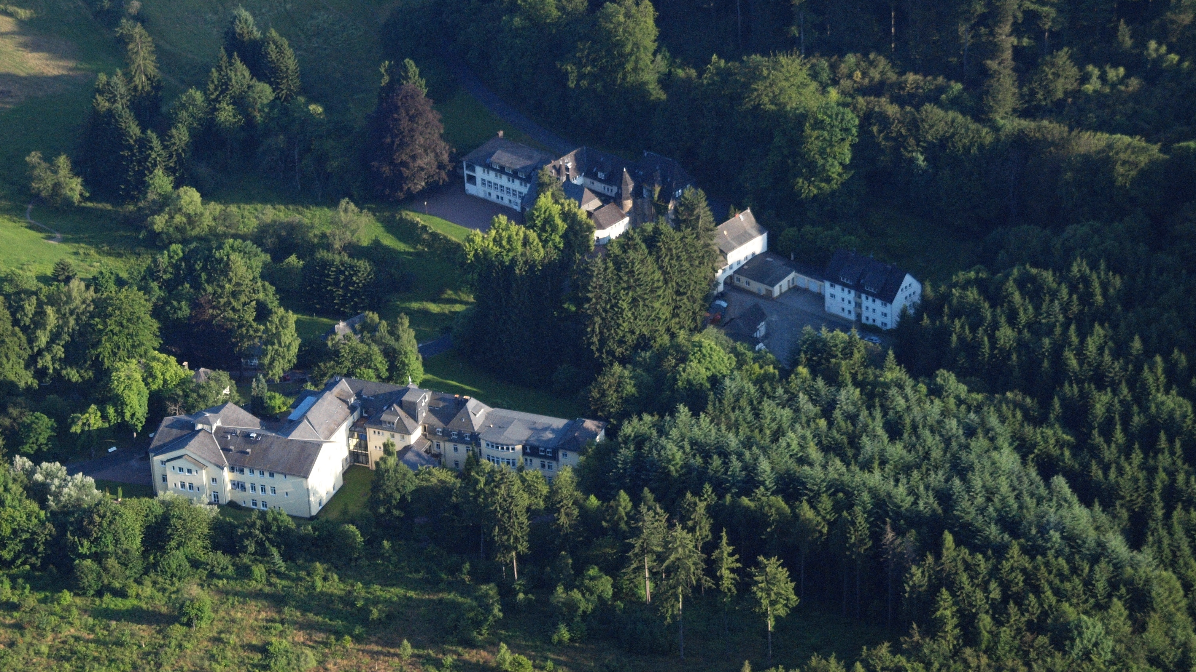 Klinik Waldhof Elgershausen: Luftaufnahme